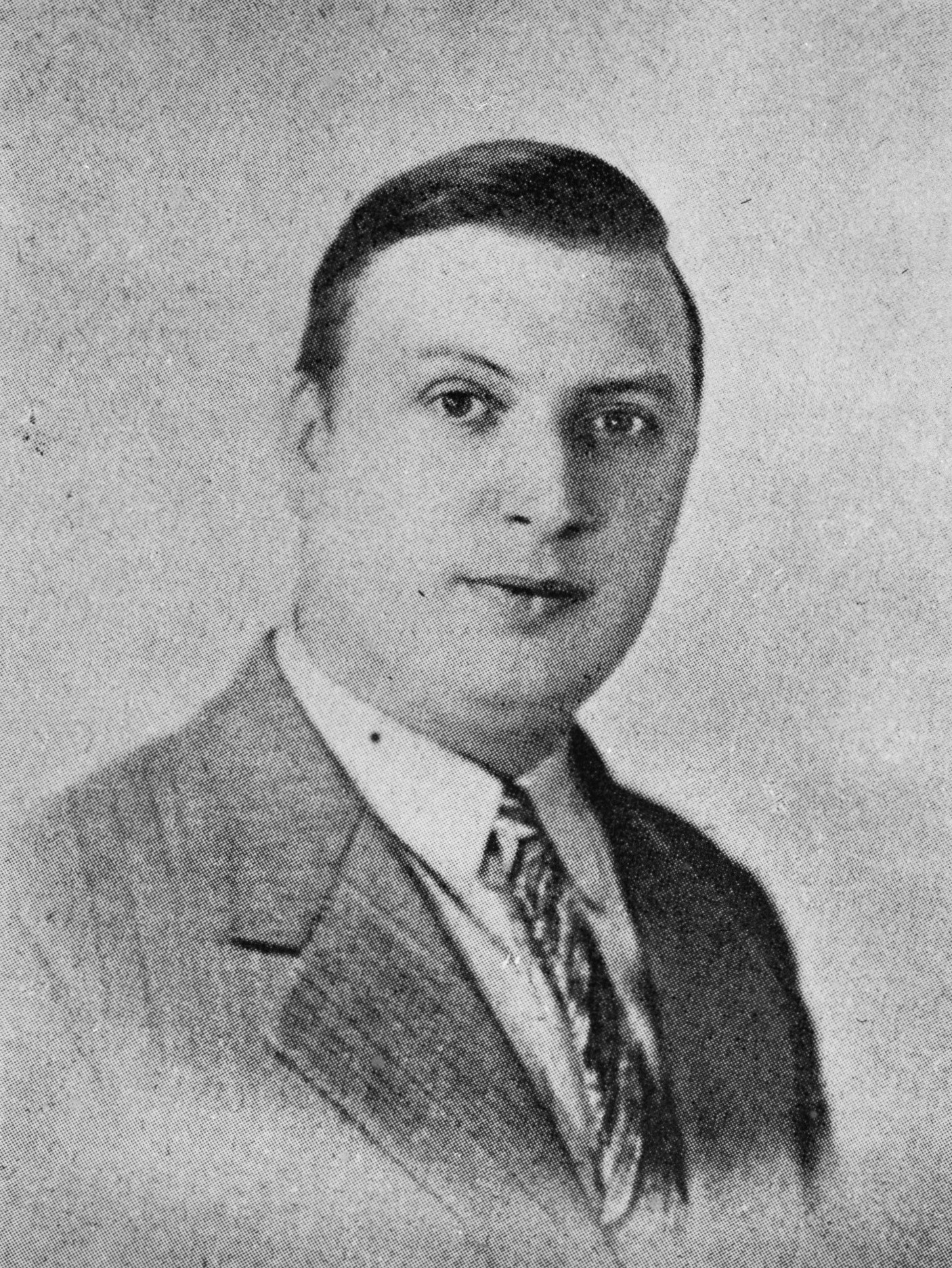 Collectie / Archief : Fotocollectie Anefo / Londen Reportage / Serie : P [Portraits/Persons] / Anefo Londen serie Beschrijving : Anton van Duinkerken (geb. 1903) Annotatie : Repronegatief. Nederlands dichter. Pseudoniem van Wilhelmus Johannes Maria Antonius Asselbergs Datum : {1940-1945} Trefwoorden : literatuur, portretten, schrijvers, tweede wereldoorlog Persoonsnaam : Asselbergs, W.J.M.A., Duinkerken, Anton van Fotograaf : Onbekend / Publiek Domein Auteursrechthebbende : Nationaal Archief Materiaalsoort : Negatief (zwart/wit) Nummer archiefinventaris : bekijk toegang 2.24.01.04 Bestanddeelnummer : 935-0992